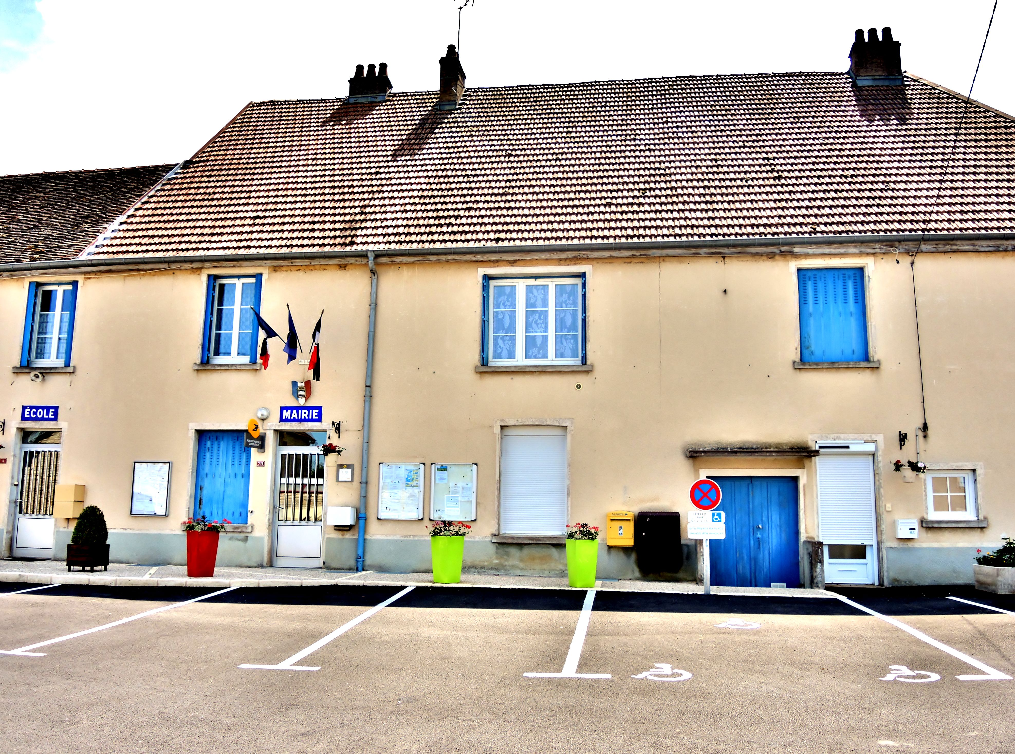 Mairie de Frasne-le-Château. Haute-Saône